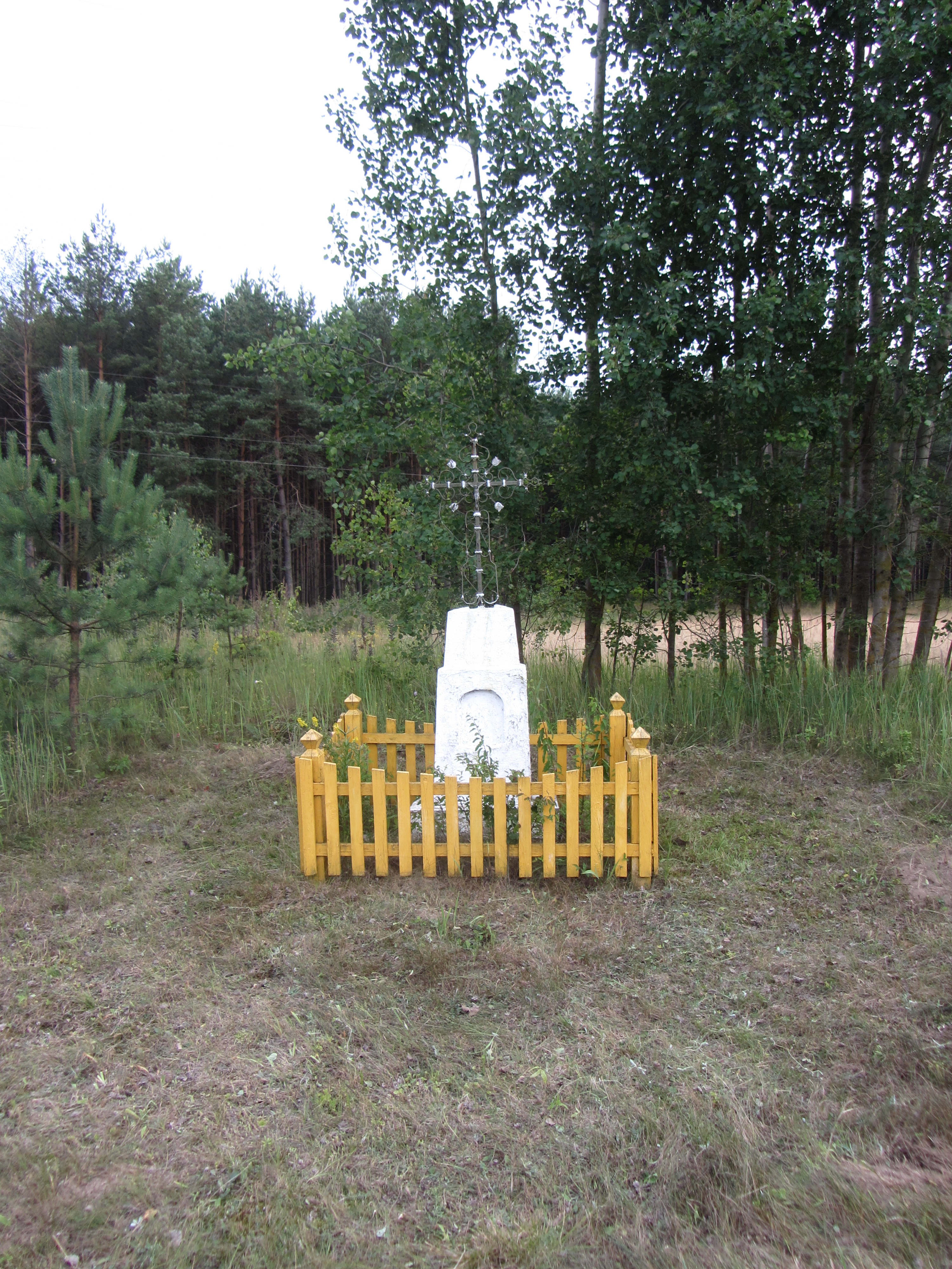 Leipalingio sen., Lithuania